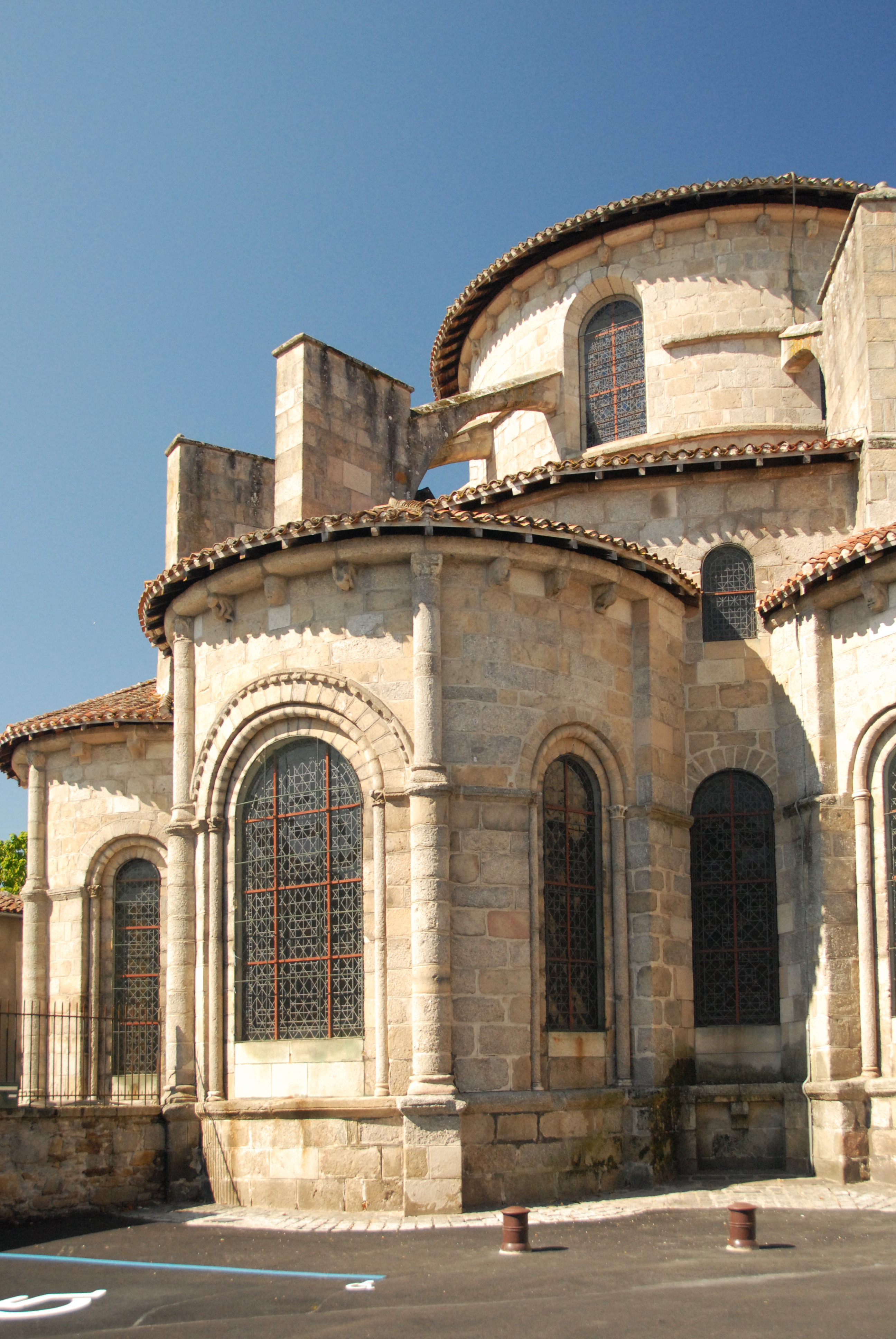 Stiftskirche St.-Léonard-de-Noblat, Radialkapellen, Umgang u. Chor